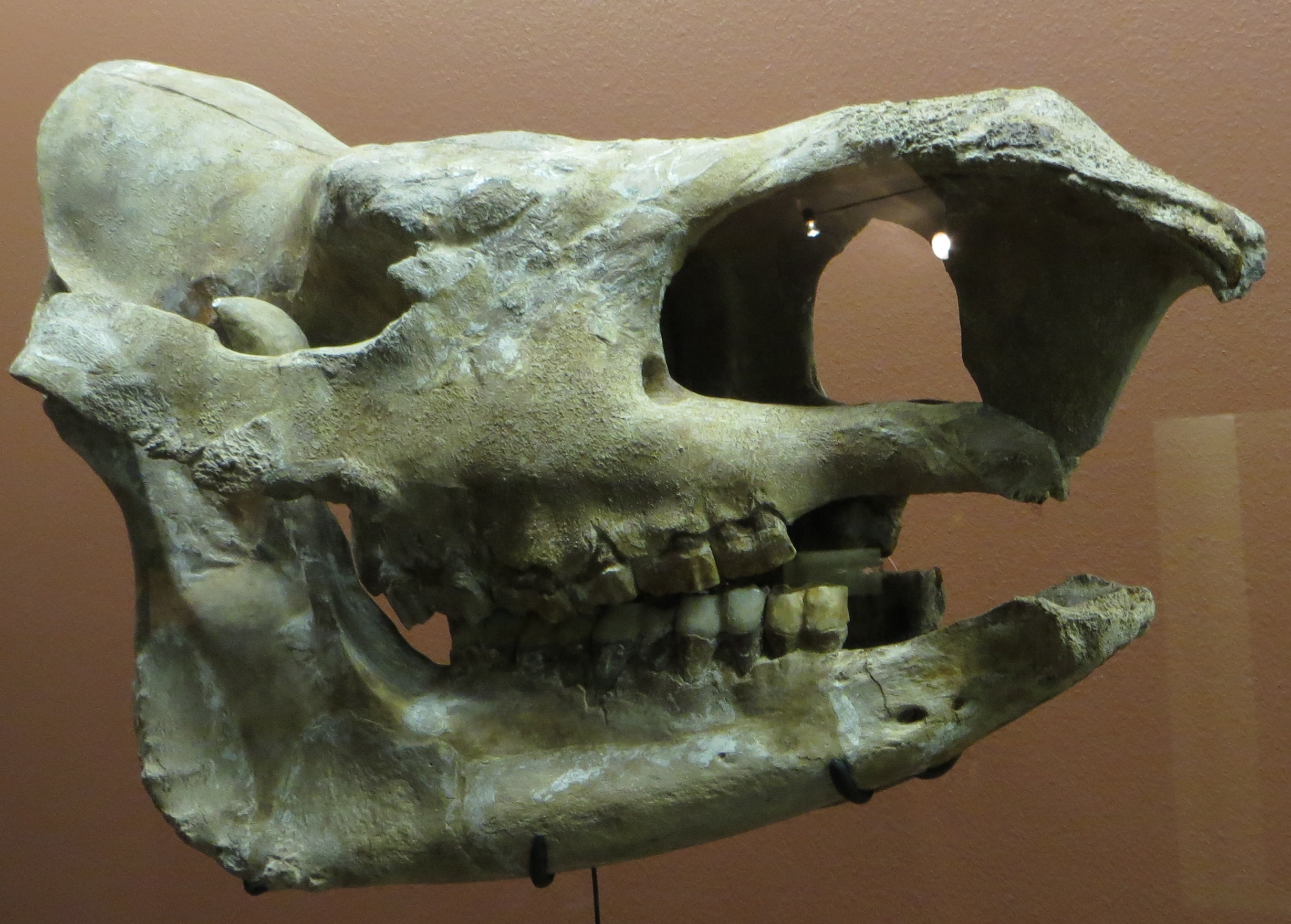 Fossil of Stephanorhinus- Took the picture at Natural History Museum, Basel